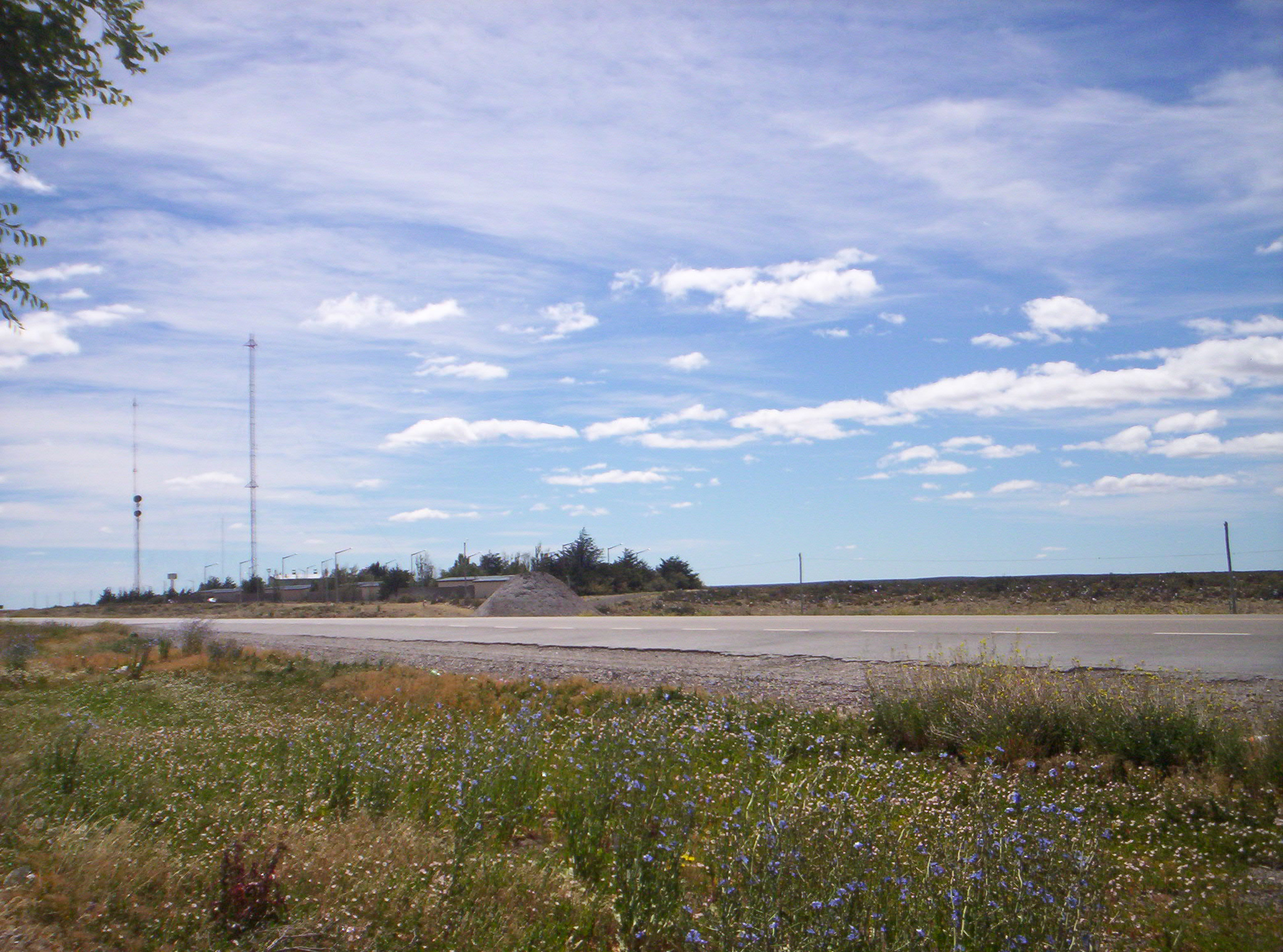 El poblado desde la ruta